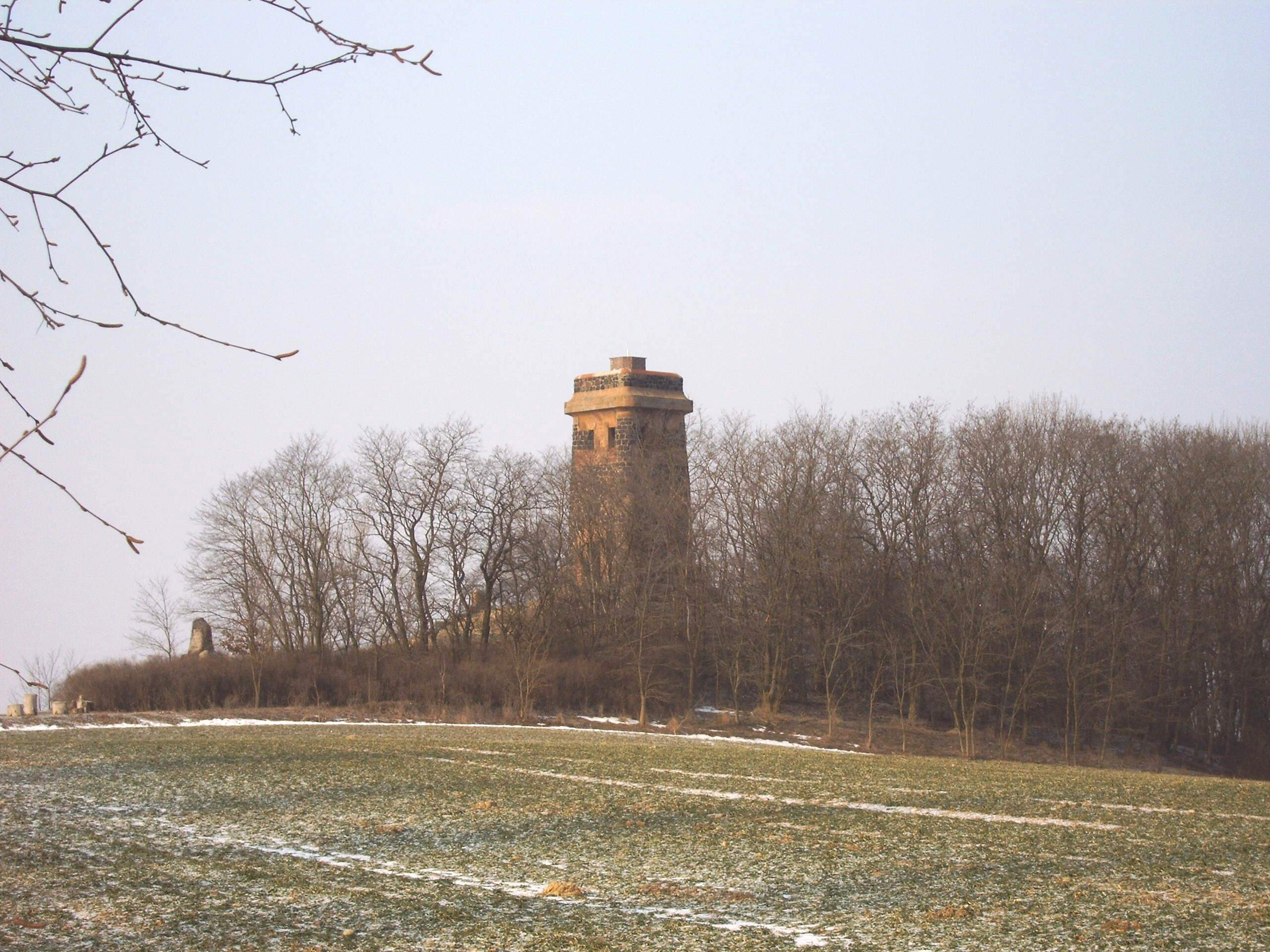 Großer Wartberg mit Bismarckturm Schnarsleben Bild aufgenommen am 26.1.2006